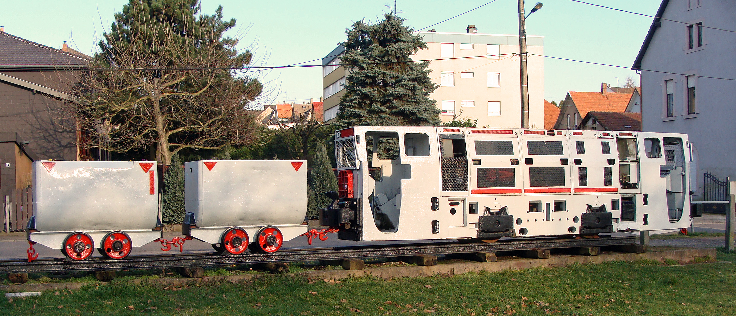 Train d'exploitation de mine (motrice et wagons), L'Hôpital (Moselle), monument de la cité minière de Bois-Richard.